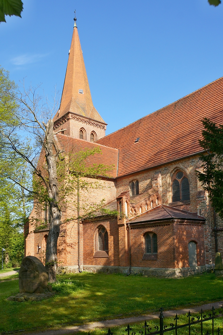 Blick vom Friedhofstor